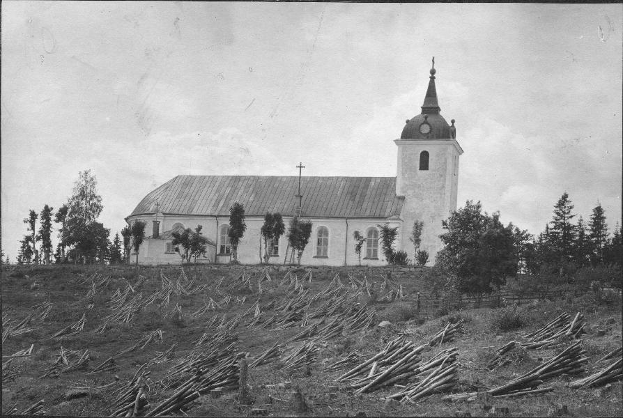 Kyrkans exteriör. Torn i norr och kor åt söder.